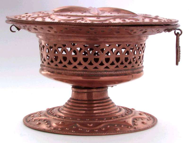 Fyrfatmed i kobber for plassering på gulvet som fotvarmer. Fyrfatet har et løst lokk og er trolig fra 2. halvdel av 1700-årene. Foto Norsk Folkemuseum, NF.1907-0145.